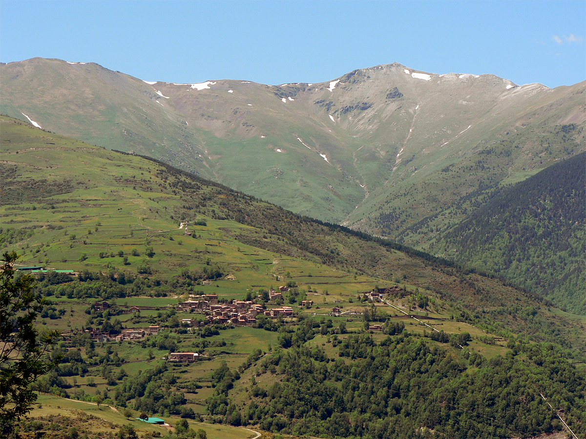 Pirineus, entre Ribes i Camprodón